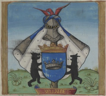 cote cliché : NQ-D-003826 légende : Armes de Caradoc Briébas. Devise : zellande département : Manuscrits occidentaux cote du document : FRANCAIS 1437 période du document : Moyen âge date du document ou du recueil : 14.. partie de : Armorial de la table ronde folio, pagination :Folio 15v catégorie : Manuscrits à peinture descripteur(s) aigle ; armoiries ; casque ; couronne ; tigre